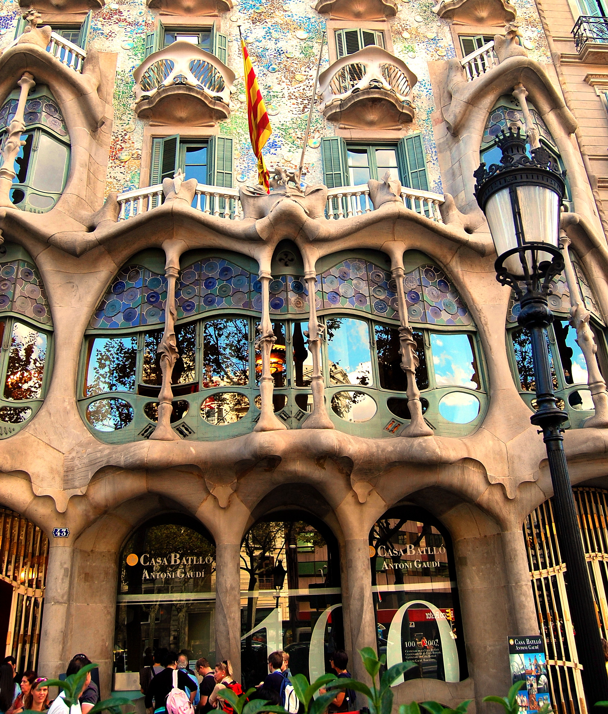 Casa Batlló - Barcellona Antoni Gaudí